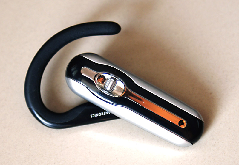 മൊബൈല്‍ ഫോണുകളുടെ കൂടെ ഉപയോഗിക്കുന്ന ബ്ലൂ ടൂത്ത് ഹാന്‍സ്ഫ്രീ.